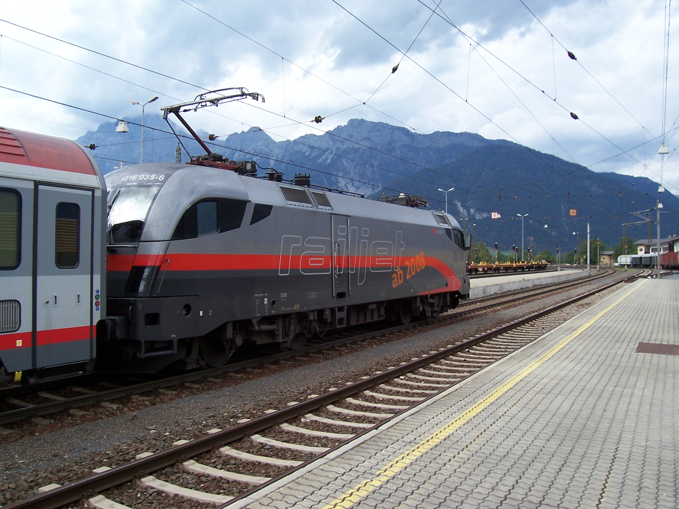 ÖBB Taurus 1016 035 in railjet-Lackierung